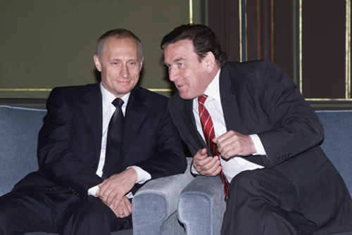 ВЕЙМАР. Беседа с Федеральным канцлером ФРГ Герхардом Шредером.